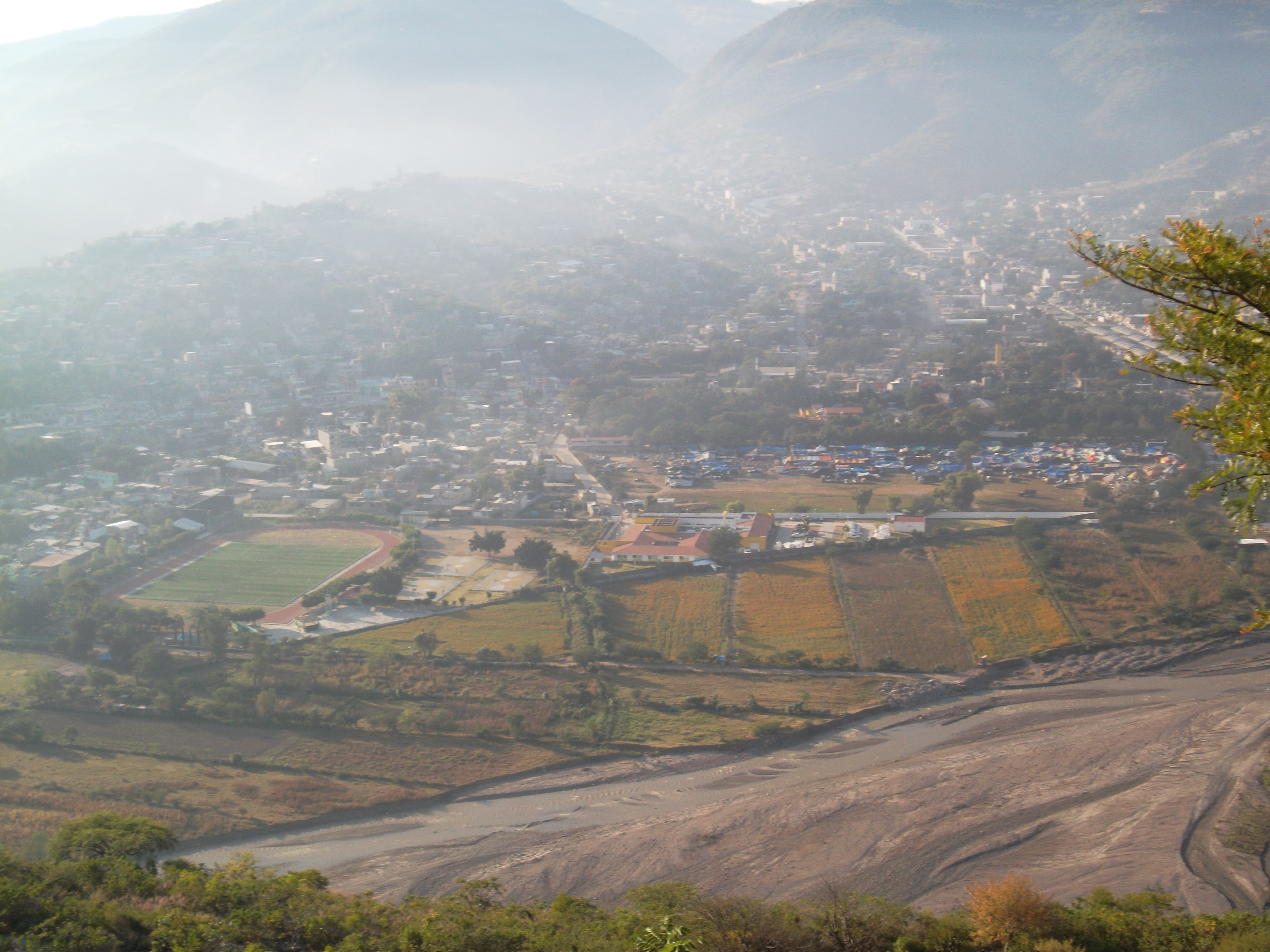 vista de Tlapa desde la parte media del Cerro de la Cruz